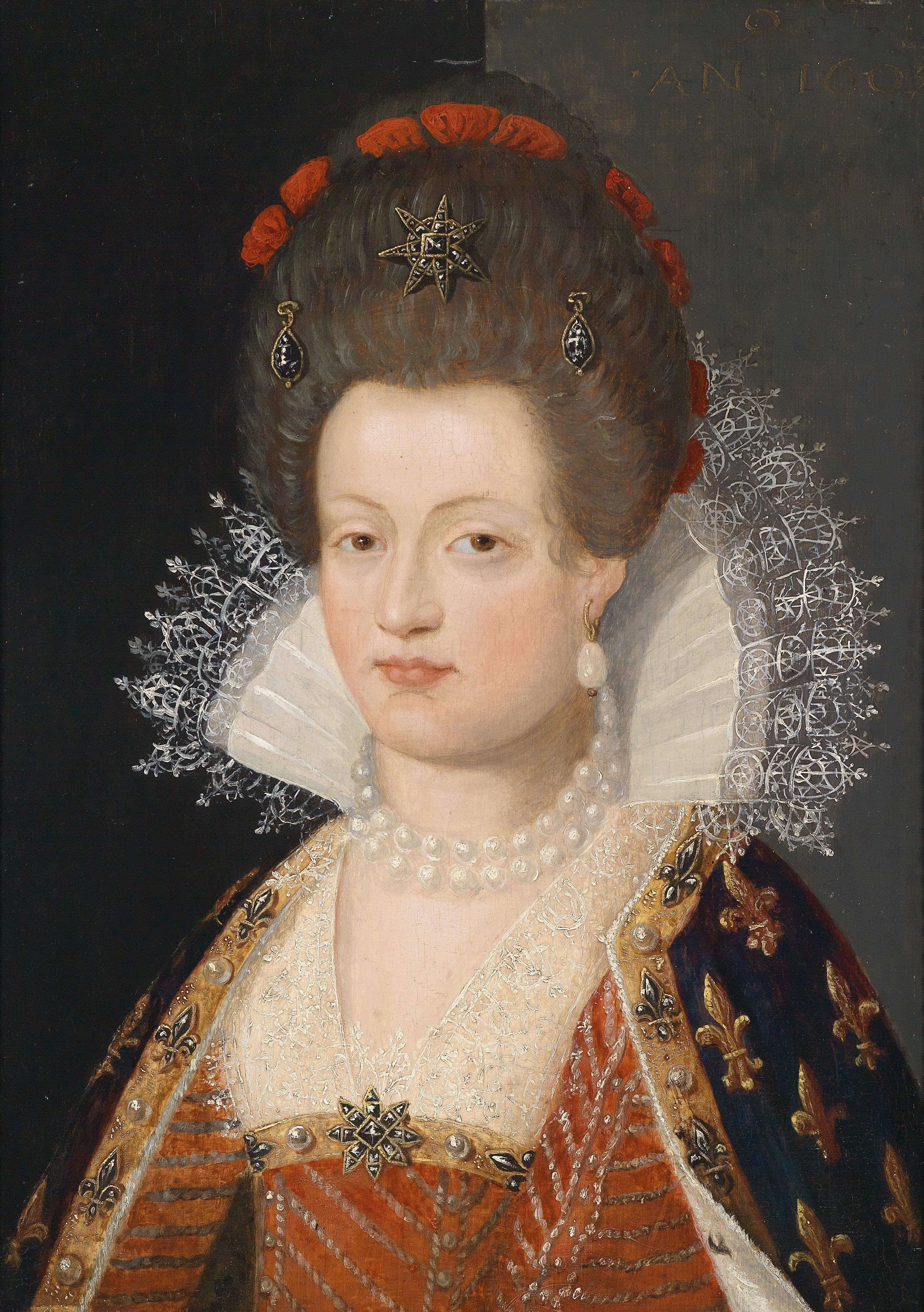 Portrait of Maria de'Medici, Königin von Frankreich (1575–1642)